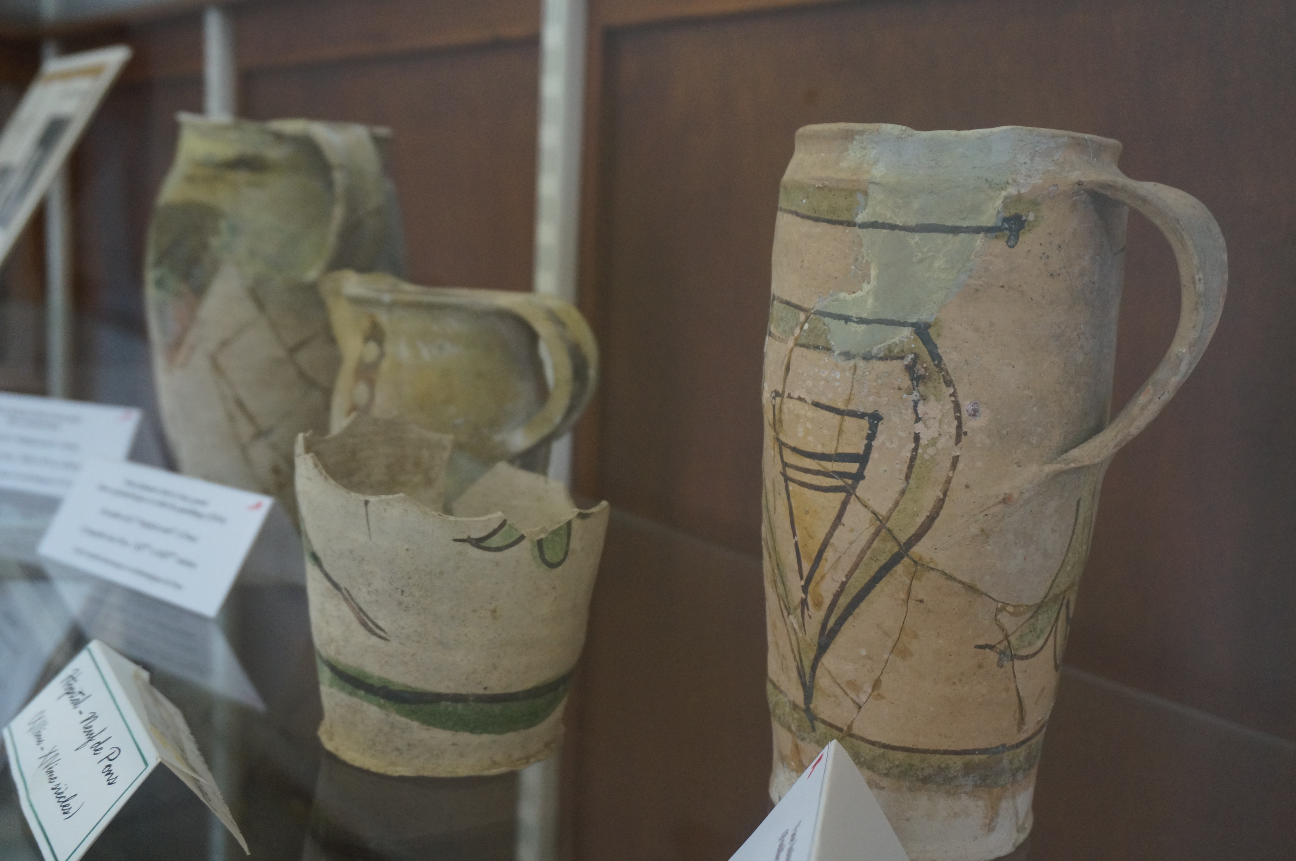 présenté au Musée archéologique de Pons.